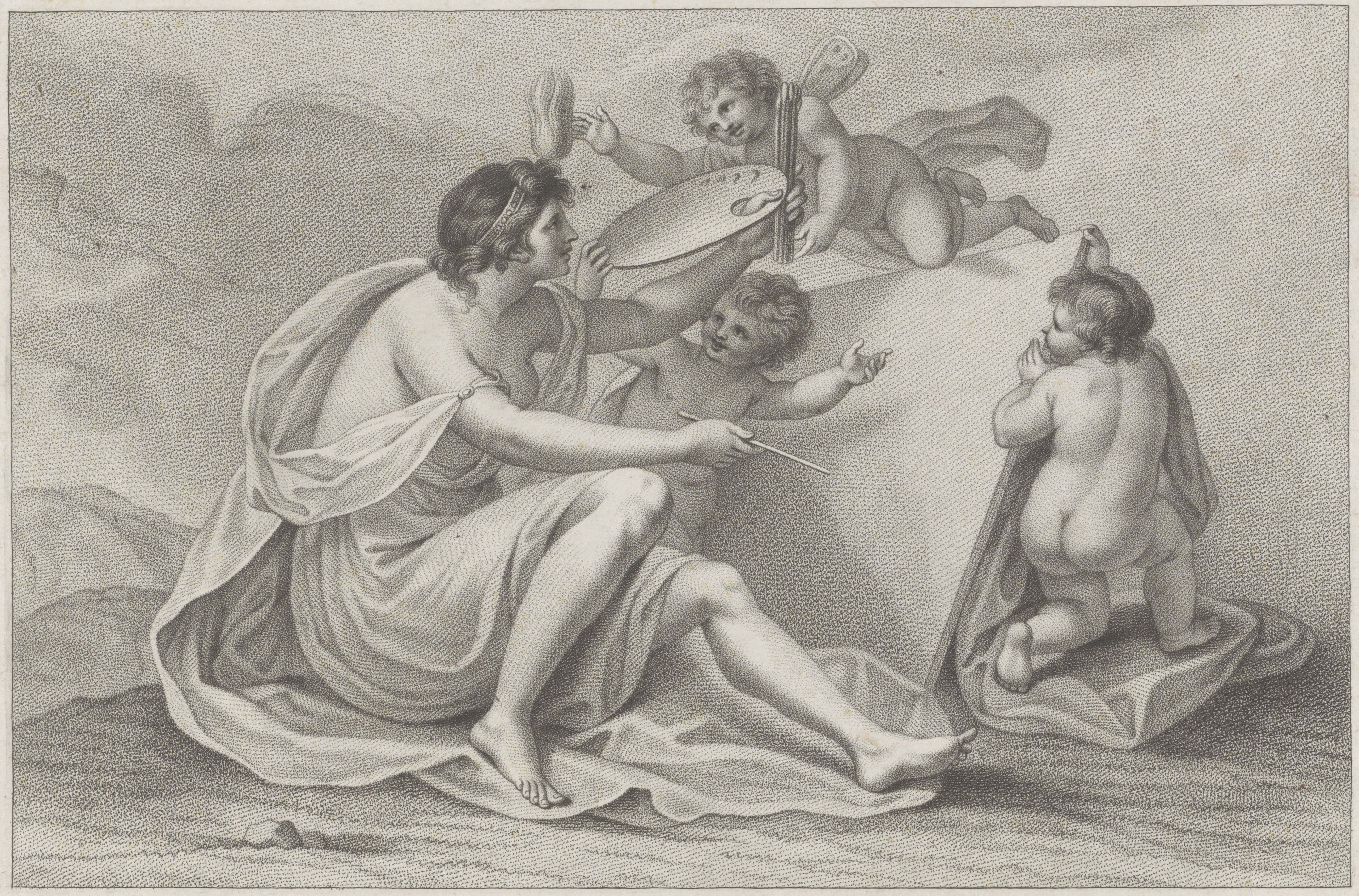 Francesco Bartolozzi d'après Giovanni Battista Cipriani, "La peinture", Rijksmuseum, Amsterdam, inv. RP-P-1942-394.